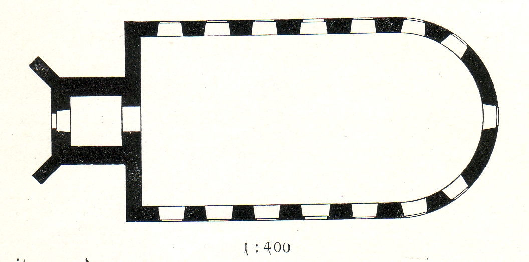 St. Simeon (Löhne)